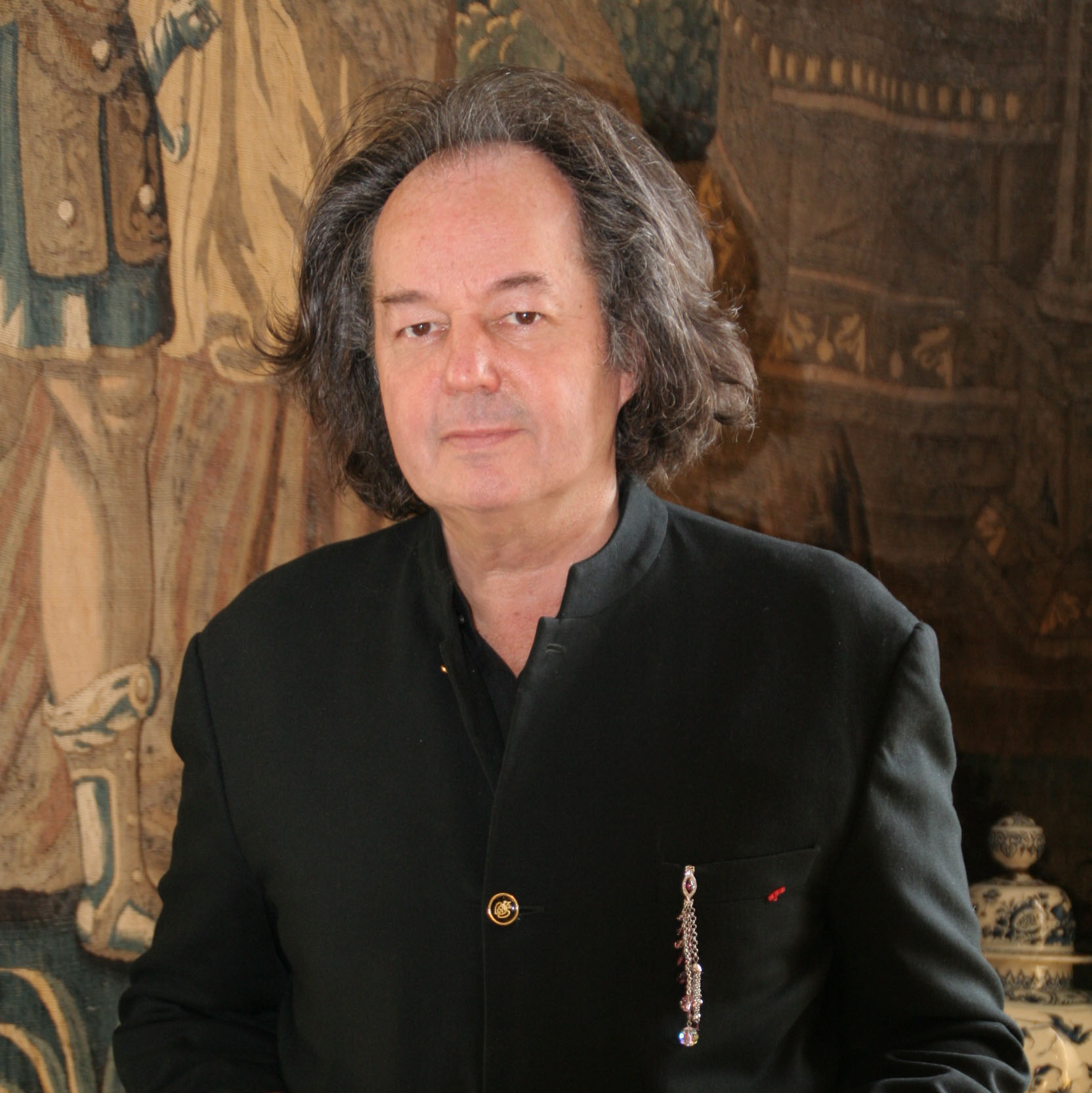 Gonzague Saint-Bris au Clos Lucé à Amboise-2007